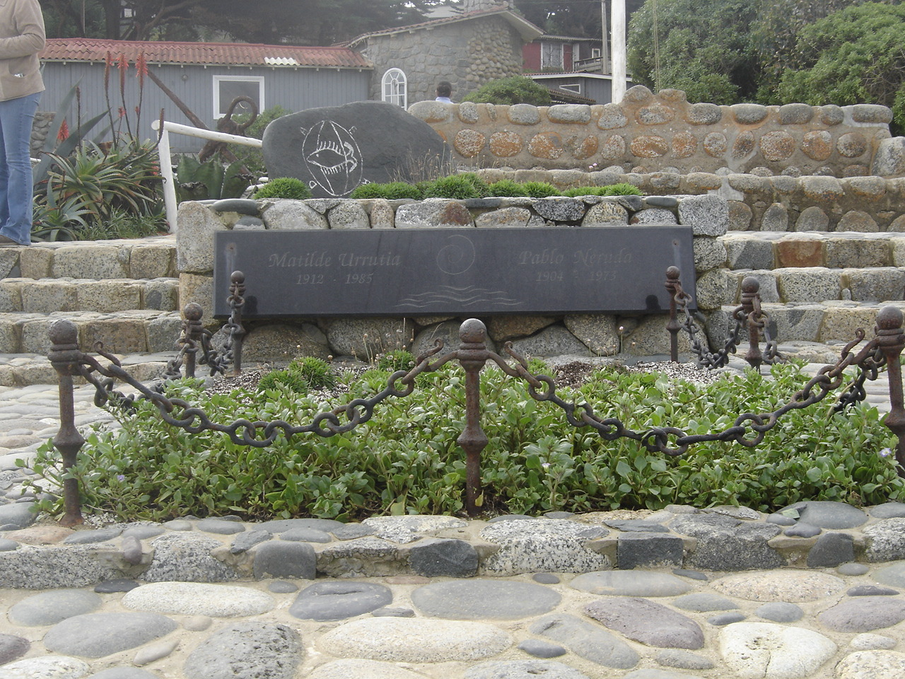 Tumba de Pablo Neruda y Matilde Urrutia, Isla Negra, Chile